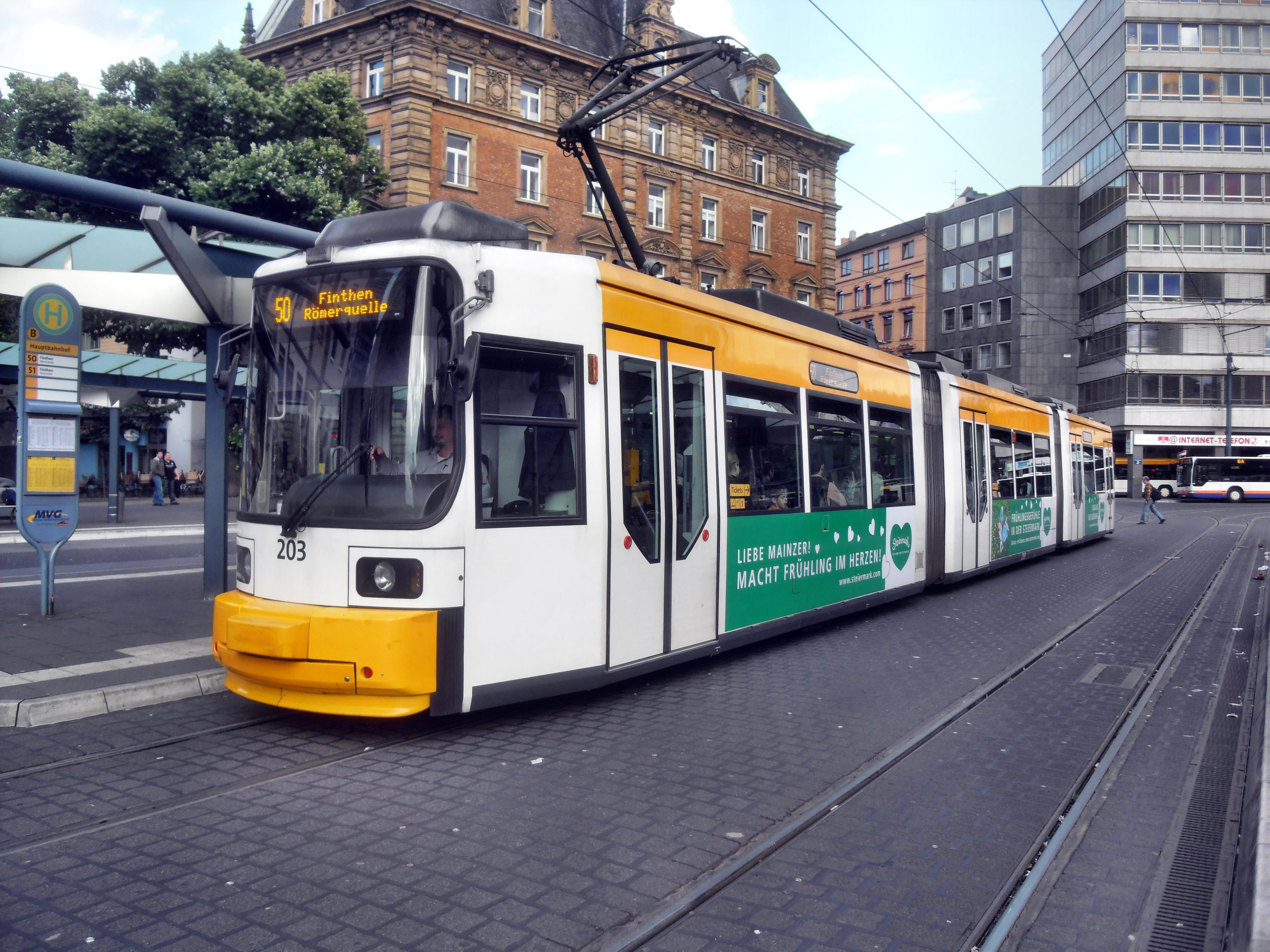 GT6M-ZR 203 an der Straßenbahnhaltestelle des Mainzer Hauptbahnhofes.